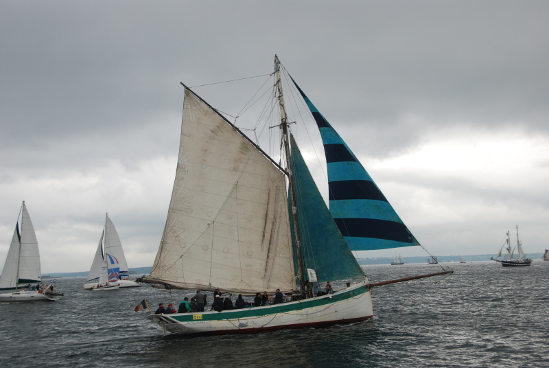 Krog e Barz , cotre-langoustier, à Brest 2008